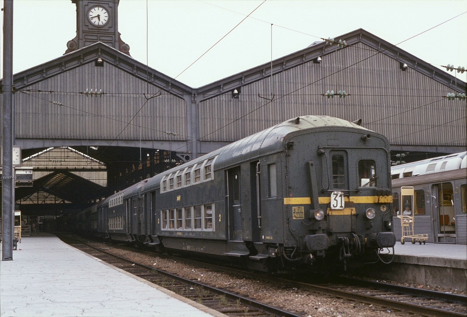 Un train de banlieue composé de voitures à deux niveaux ex-Etat, attend le départ en gare de Paris-Saint-Lazare le 17 septembre 1982.